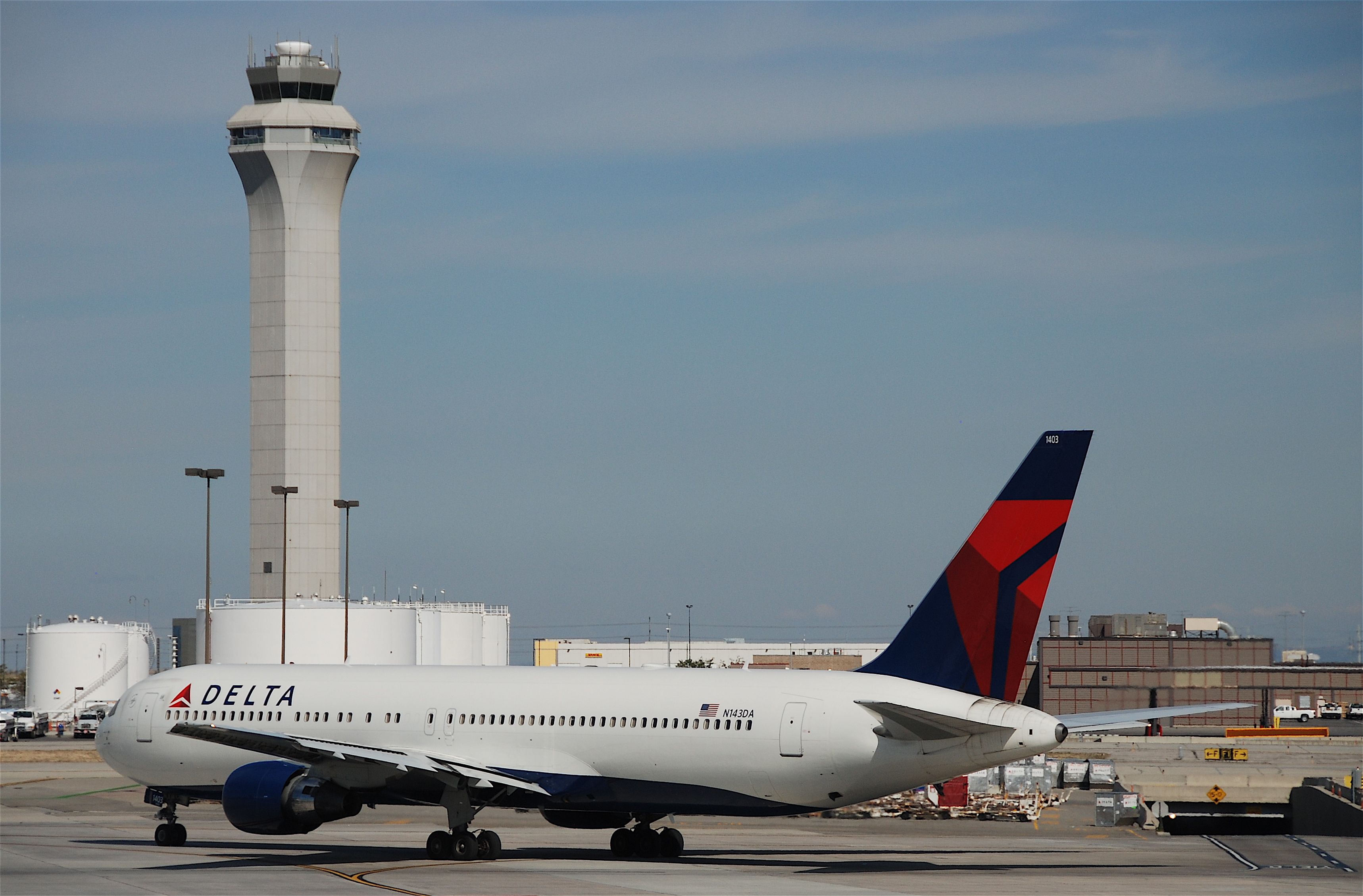 Delta Air Lines Boeing 767-300; N143DA@SLC;09.10.2011/621de